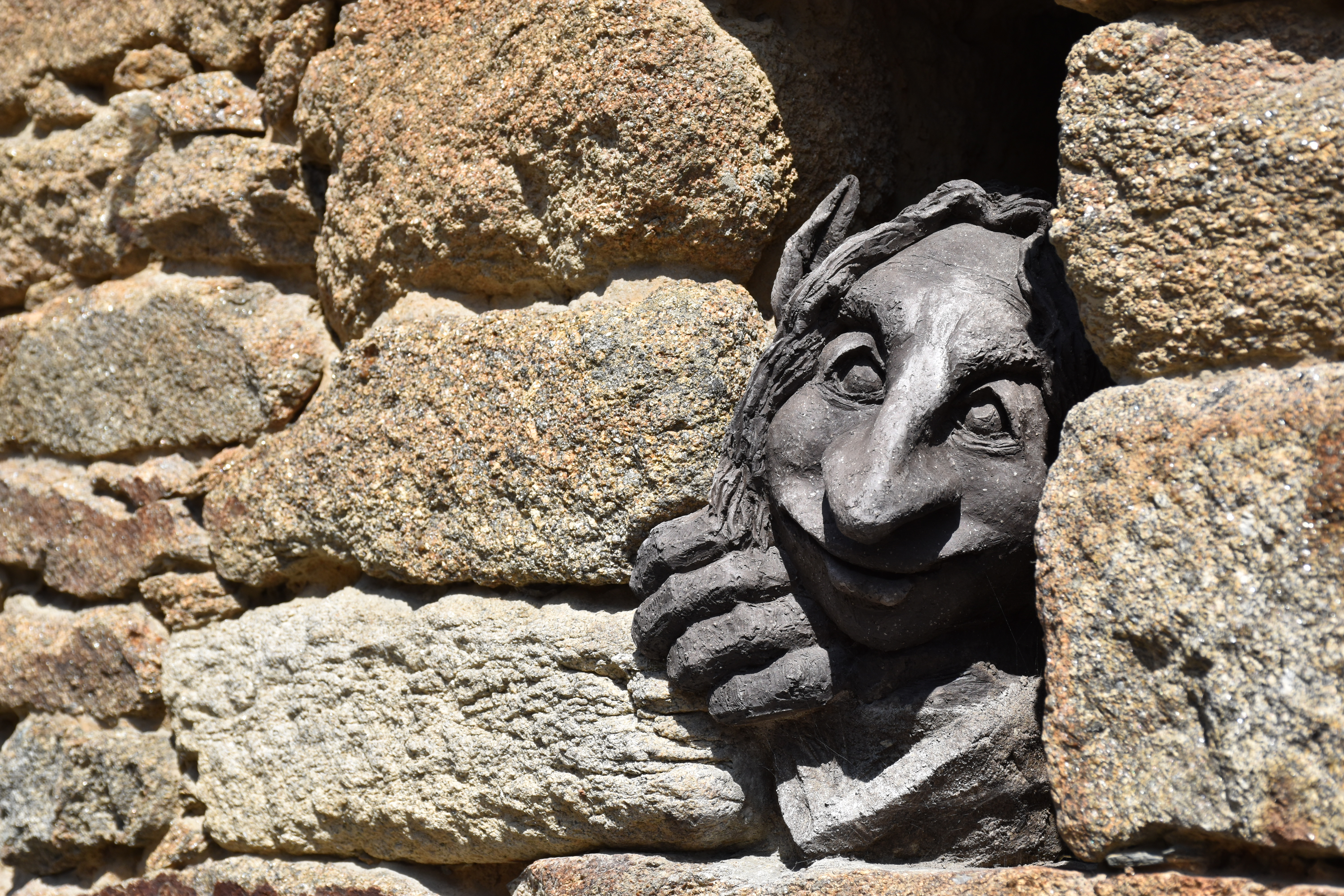 Taden - Curiosité (1)